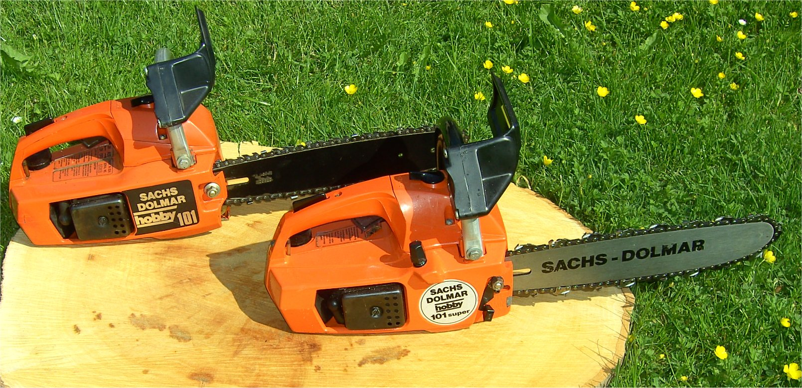 TopHandle Kettensägen, die 101Super mit Spezialkette